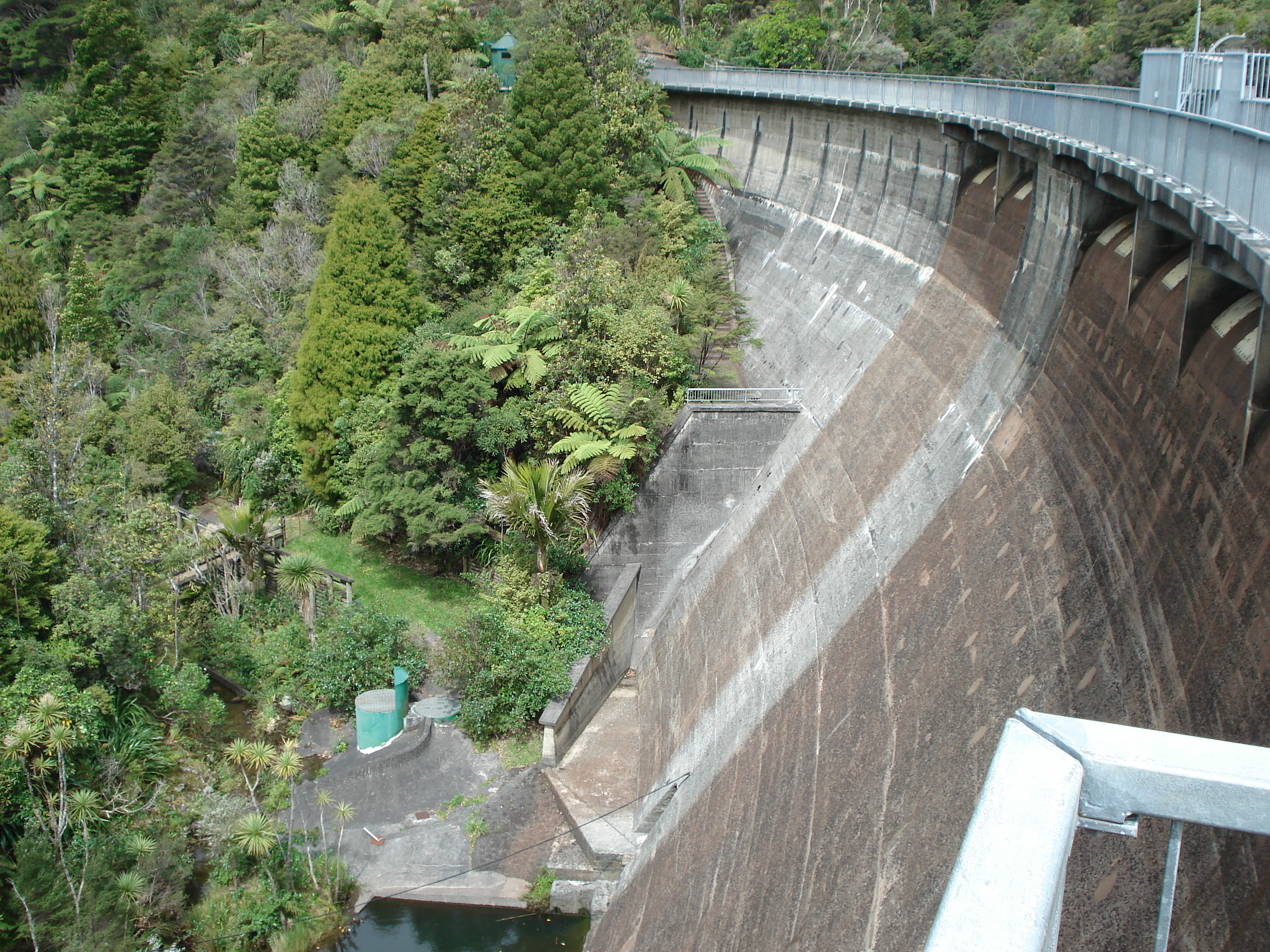 Waitakere Dam in Auckland's Waitakere Ranges.